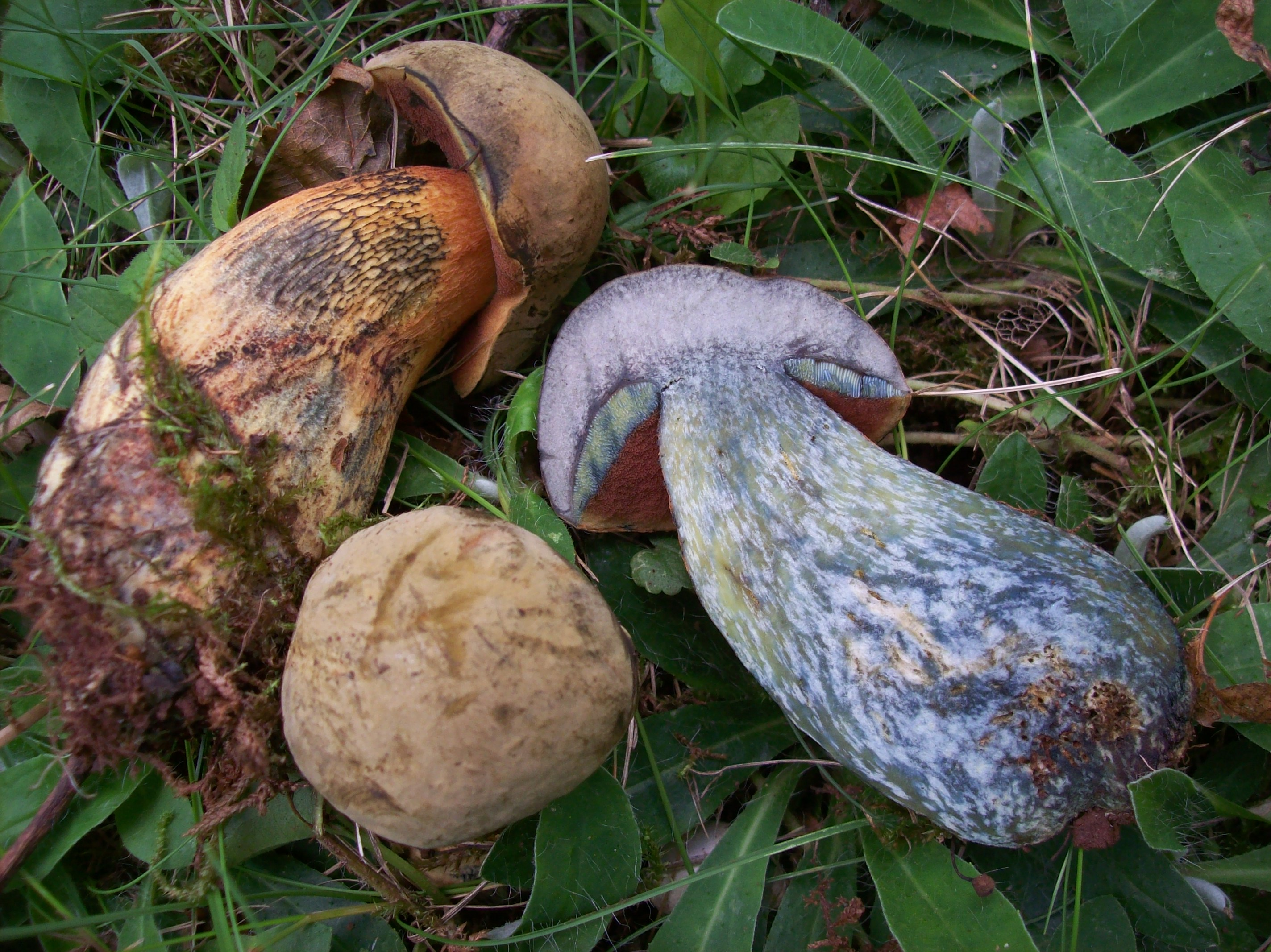 Suillellus luridus Netzstieliger Hexenröhrling jung